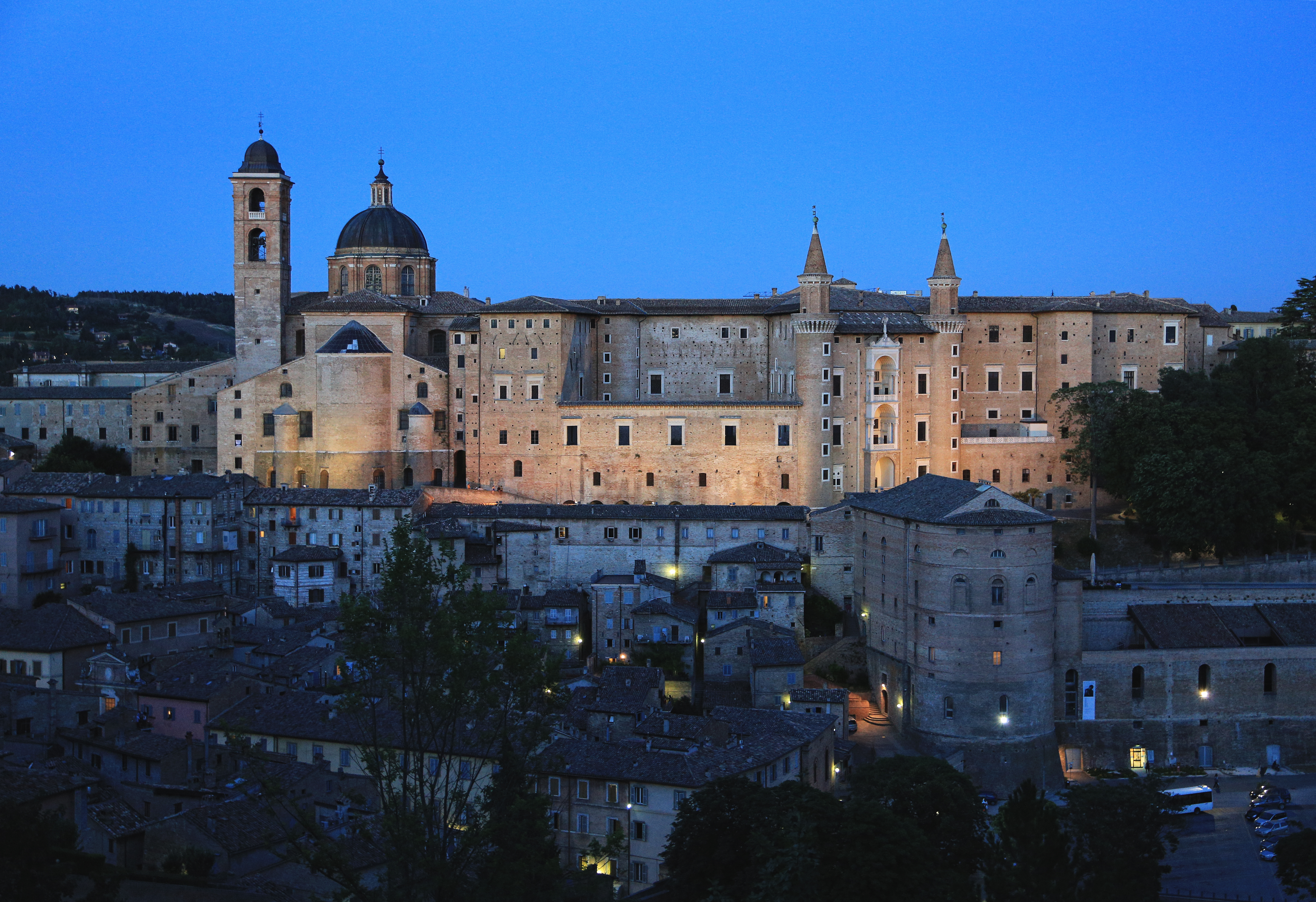 Veduta laterale del Palazzo Ducale di Urbino di sera - 0410675729-MIBAC